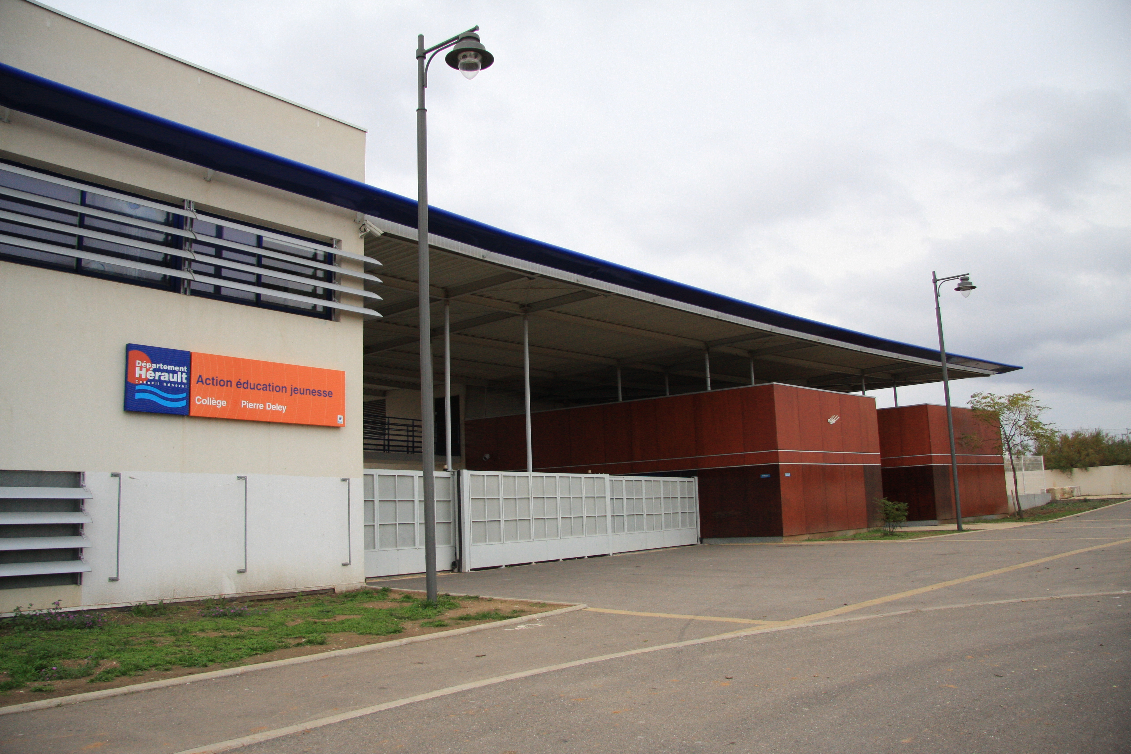 Collège Pierre Deley de Marseillan, dans l'Hérault (inauguré en 2004).